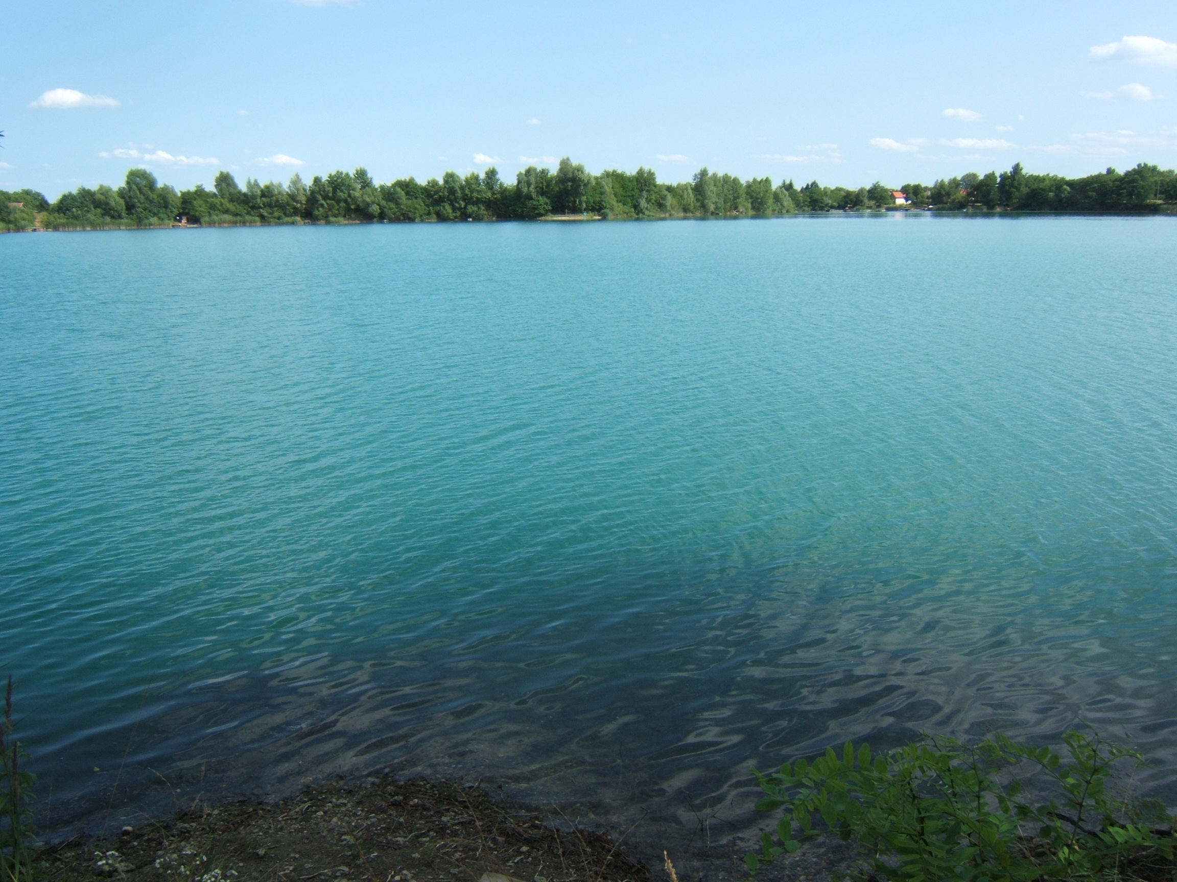 Gyékényesi kavicsbányató